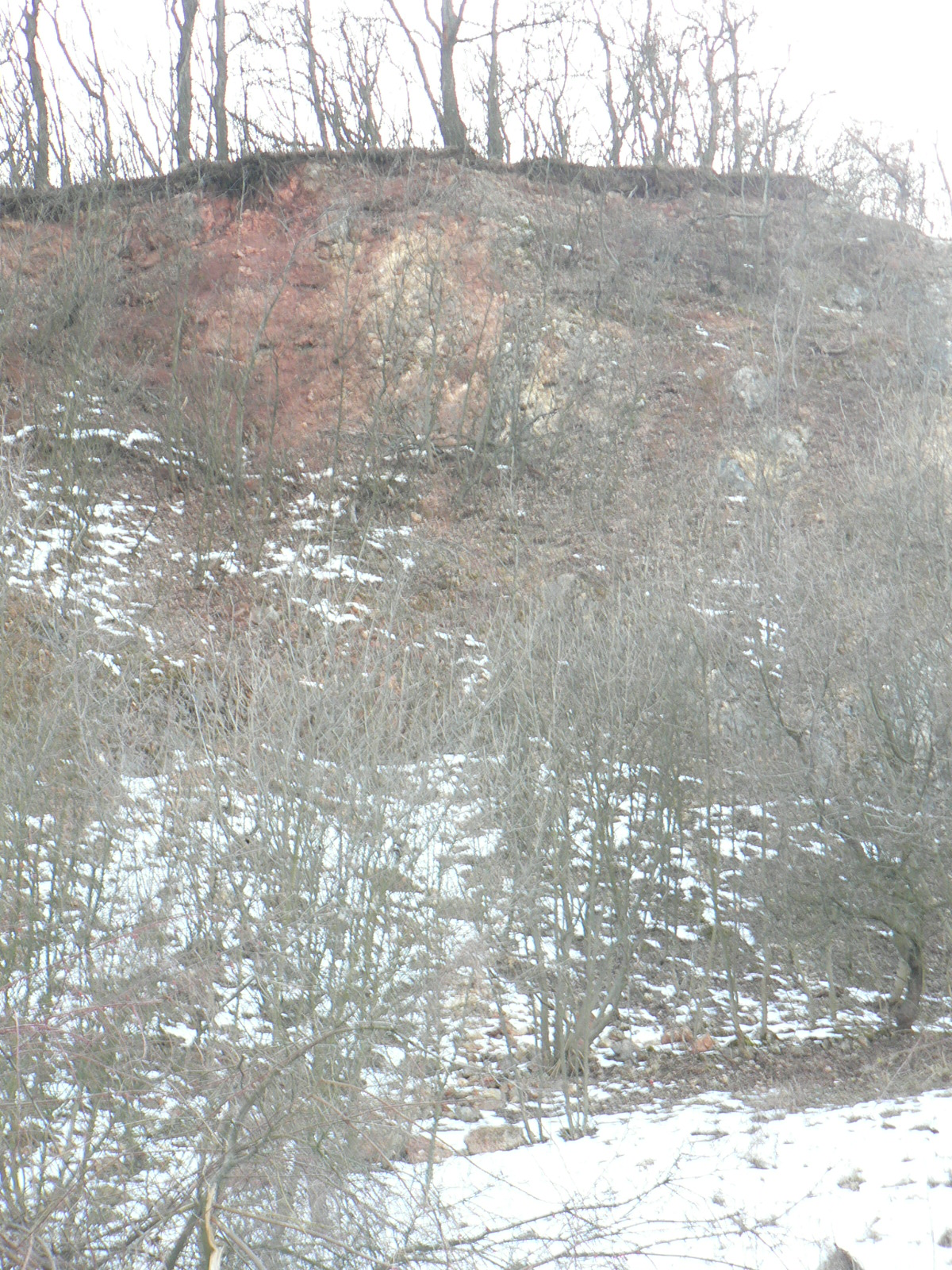 A Budaligeti-barlangot rejtő bányafal télen.